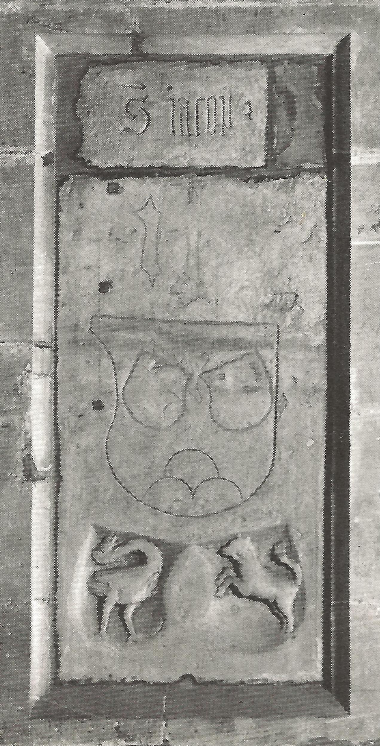 Bern, Grabplatte mit Allianzwappen Spilmann-Ross.